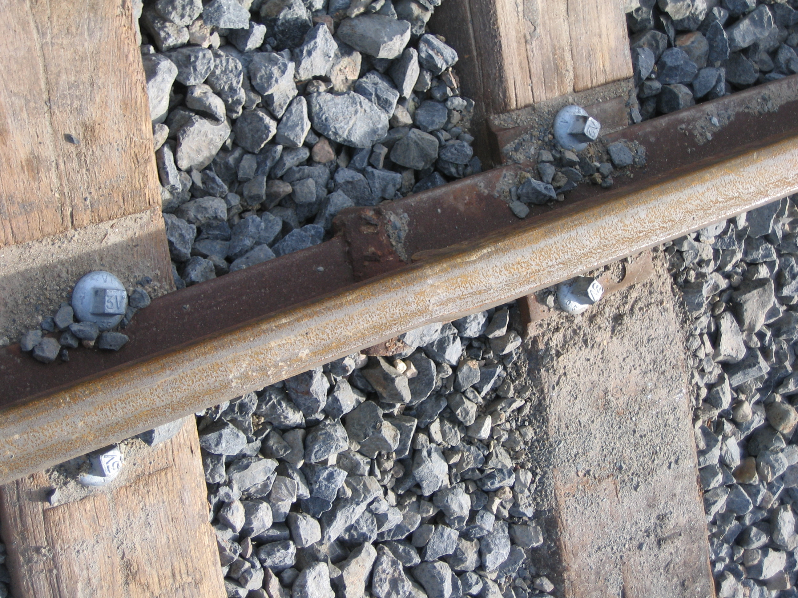 Chemins de fer de l'Hérault - Cazouls-les-Béziers, soudure entre un rail neuf et un rail «Hérault» d'origine : la différence de taille est bien visible.